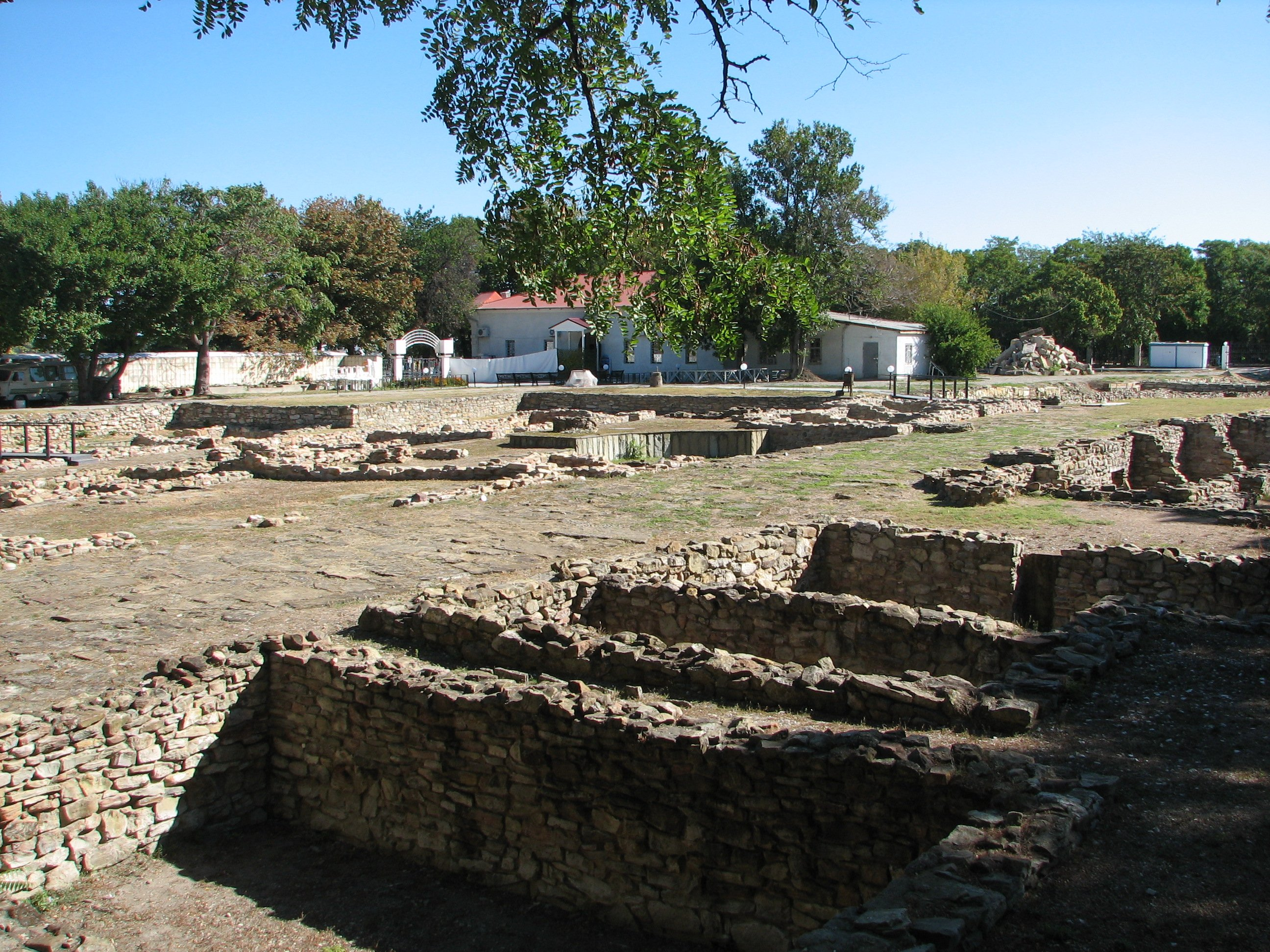 Археологический музей «Горгиппия» в Анапе. Фотография раскопок античного города Горгиппии